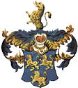 Wappen der Familie Harney von 1547